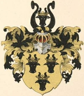 Hastferi suguvõsa aadlivapp